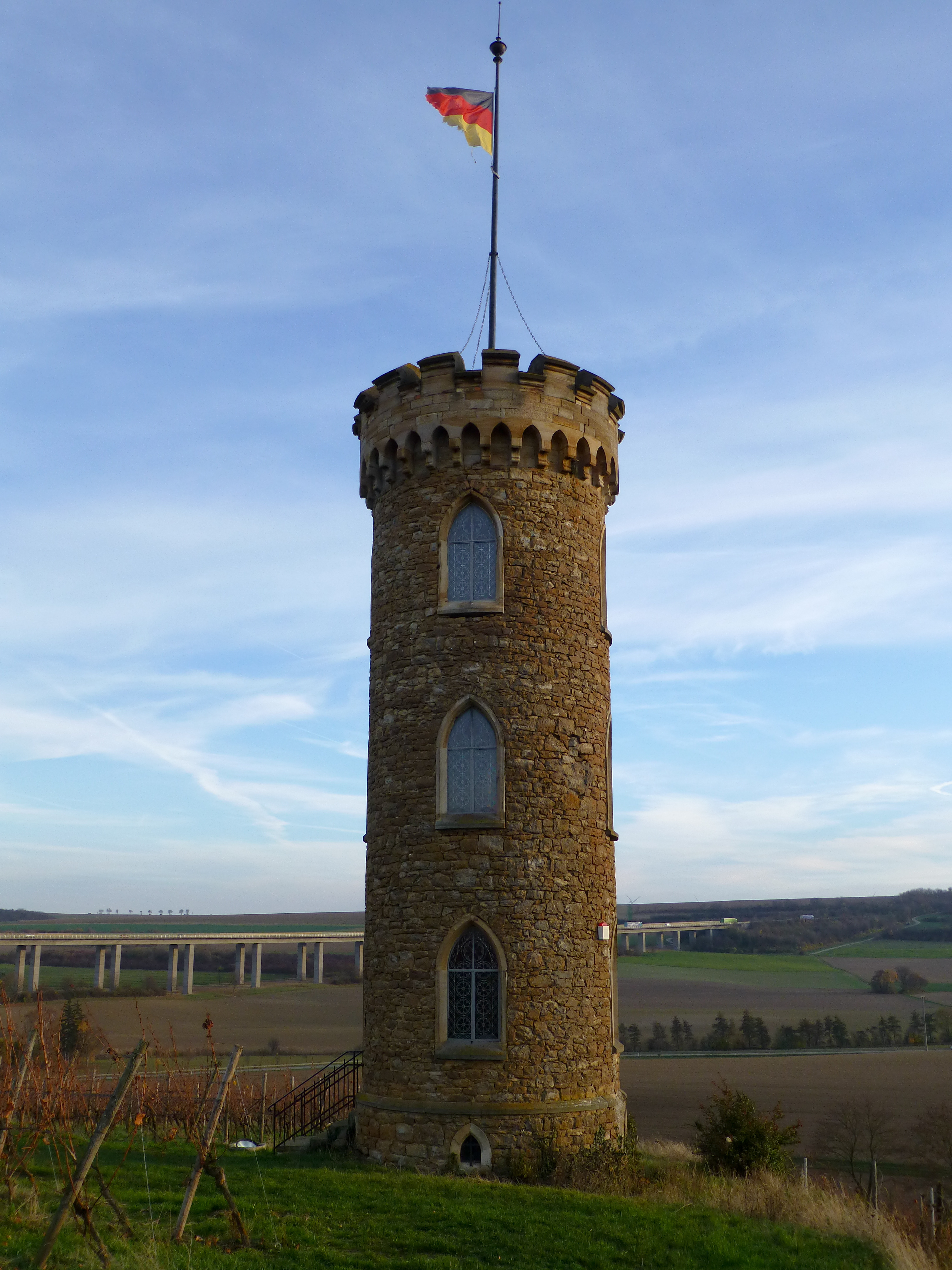 Heiligenblut-Turm, Blick vom Eingangstor am Weinberg